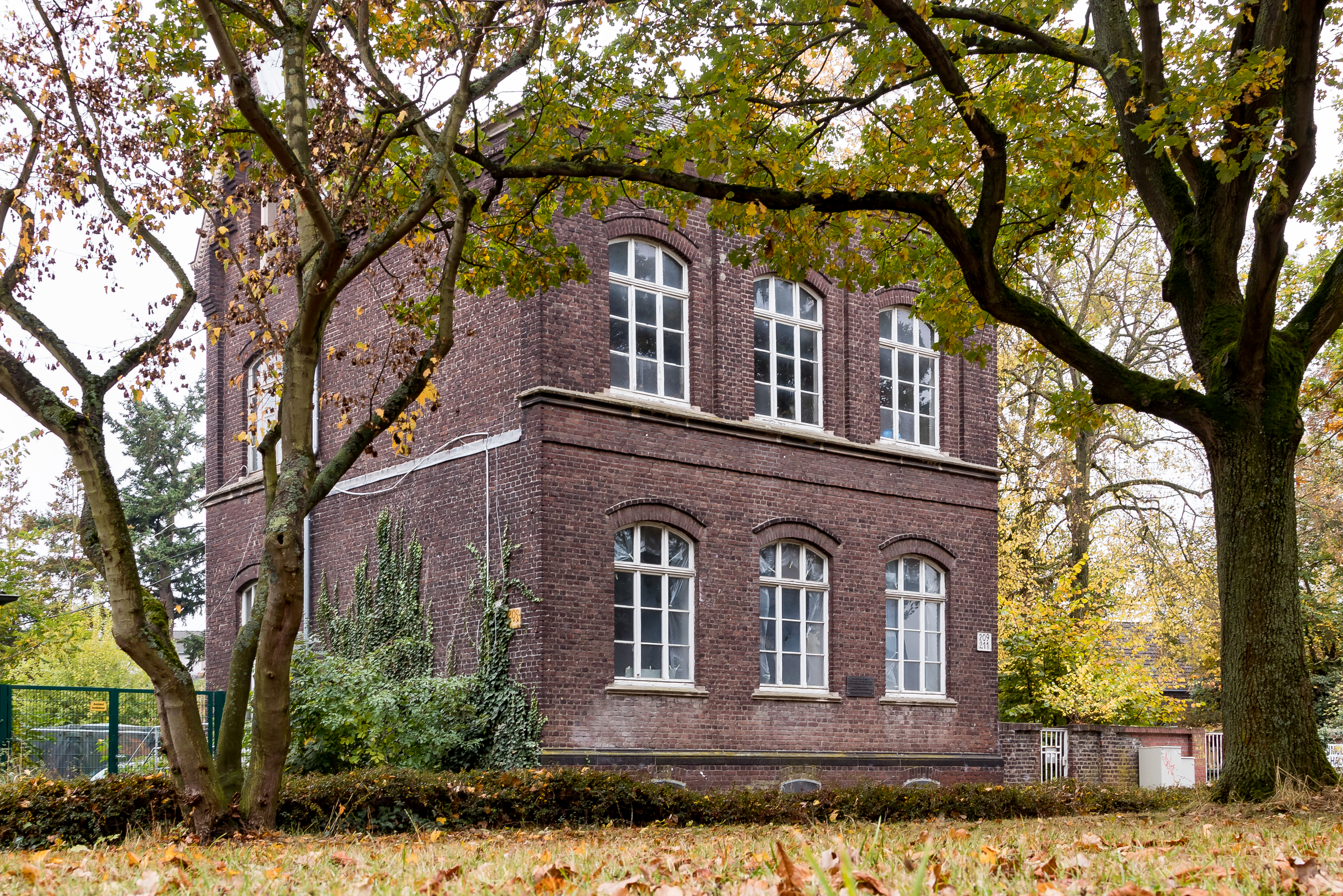 ehem. Volksschule Volkhoven, Volkhovener Weg 209–211 This is a photograph of an architectural monument.